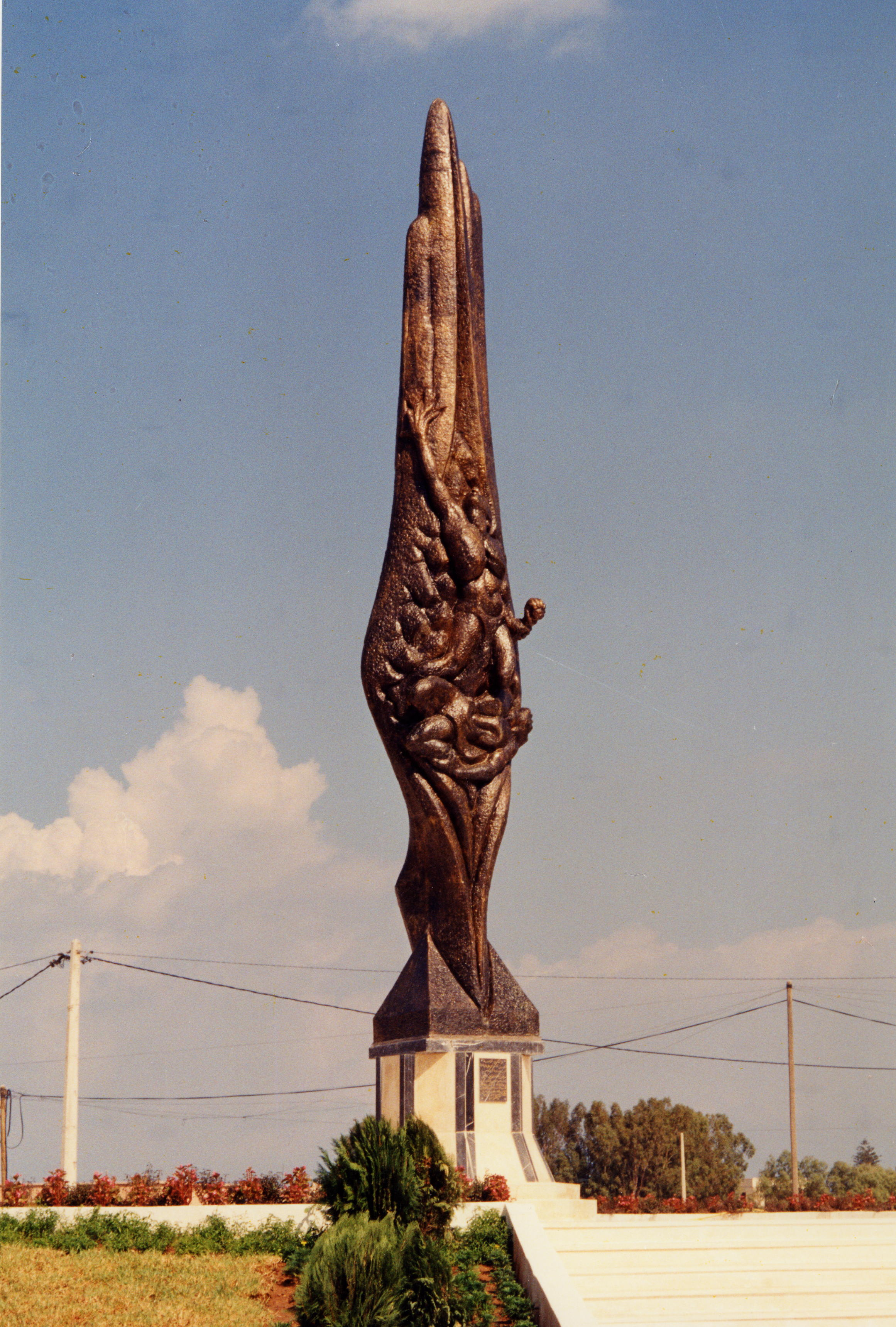 Monument aus Bronze (12 meter). Hammam Chatt - Tunis